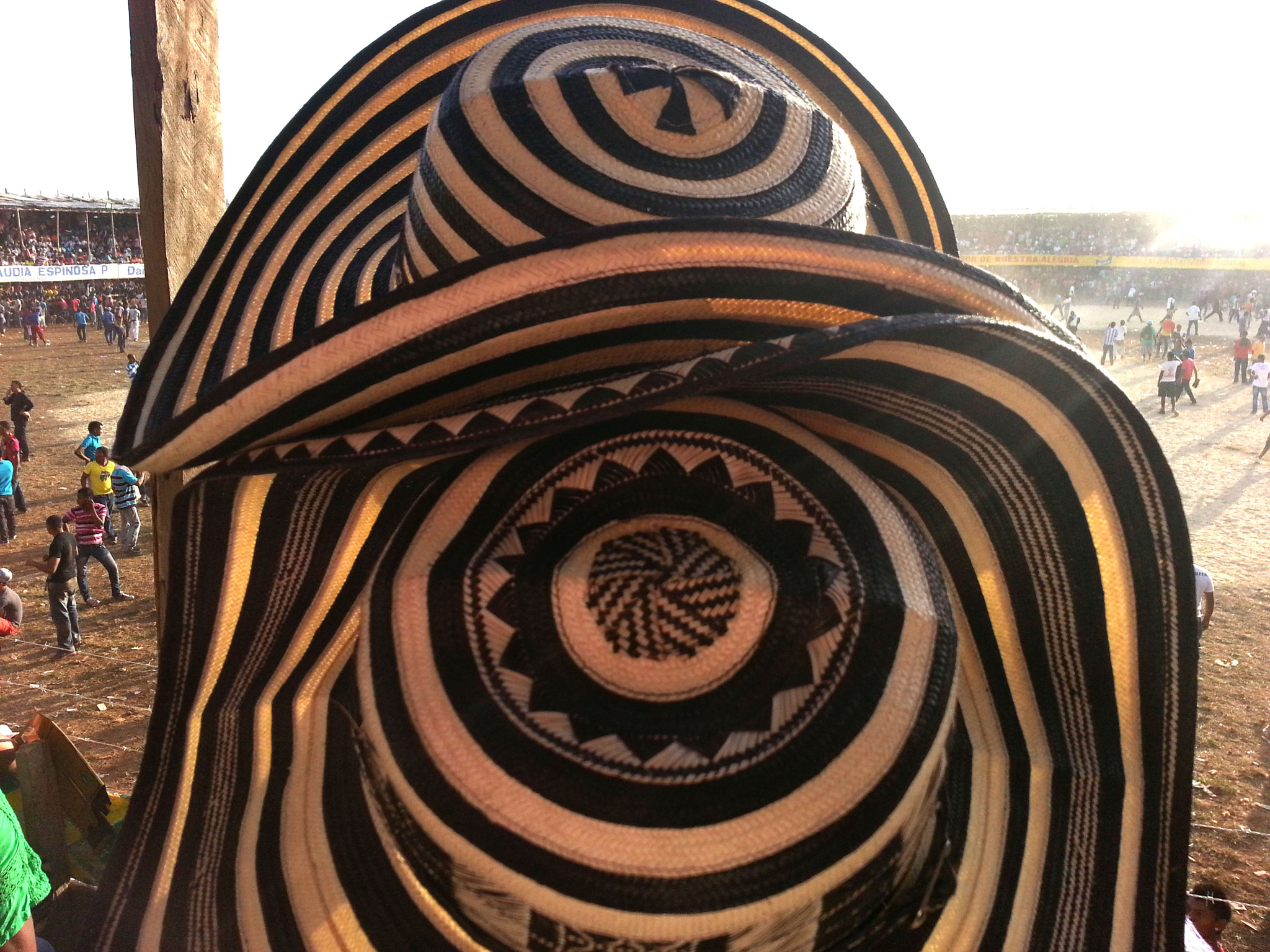 500px provided description: Corralejas de Turbaco (Colombia), venta de sombreros vueltiao [#hat ,#sombrero ,#vueltiao]